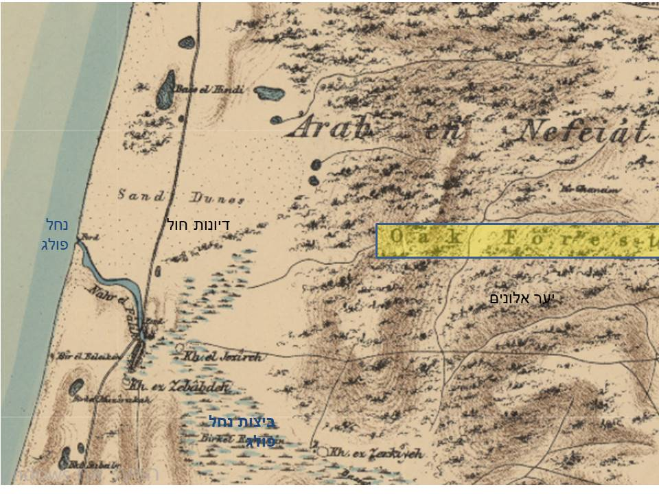 יער השרון מפת ה PEF (סביבות 1880), שימו לב להדגשה "Oak Forest" במרכזה ולביצות הפולג שאין היער צומח בהם